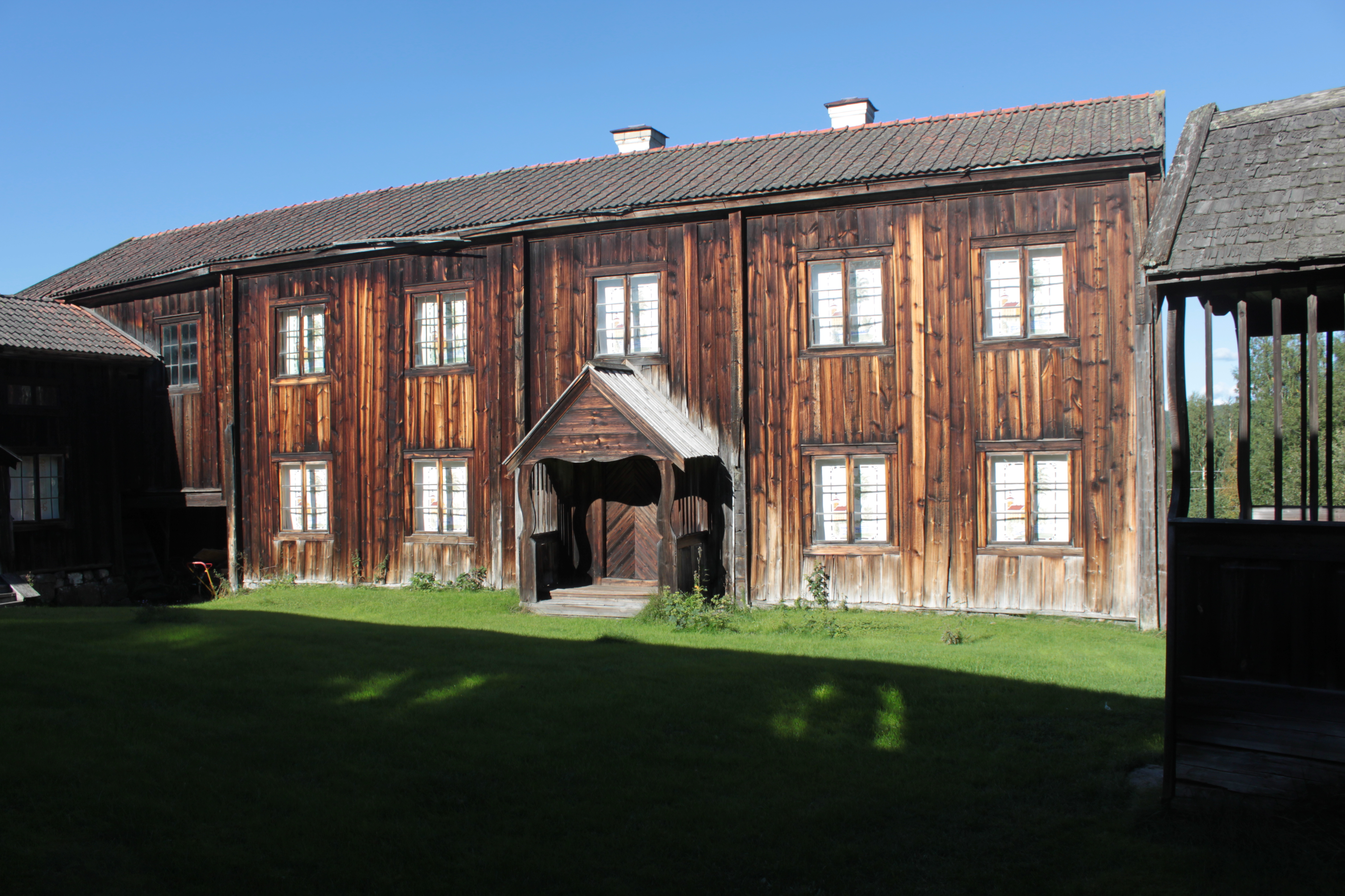 Del av gårdstunet och byggnader på Gammellåks.